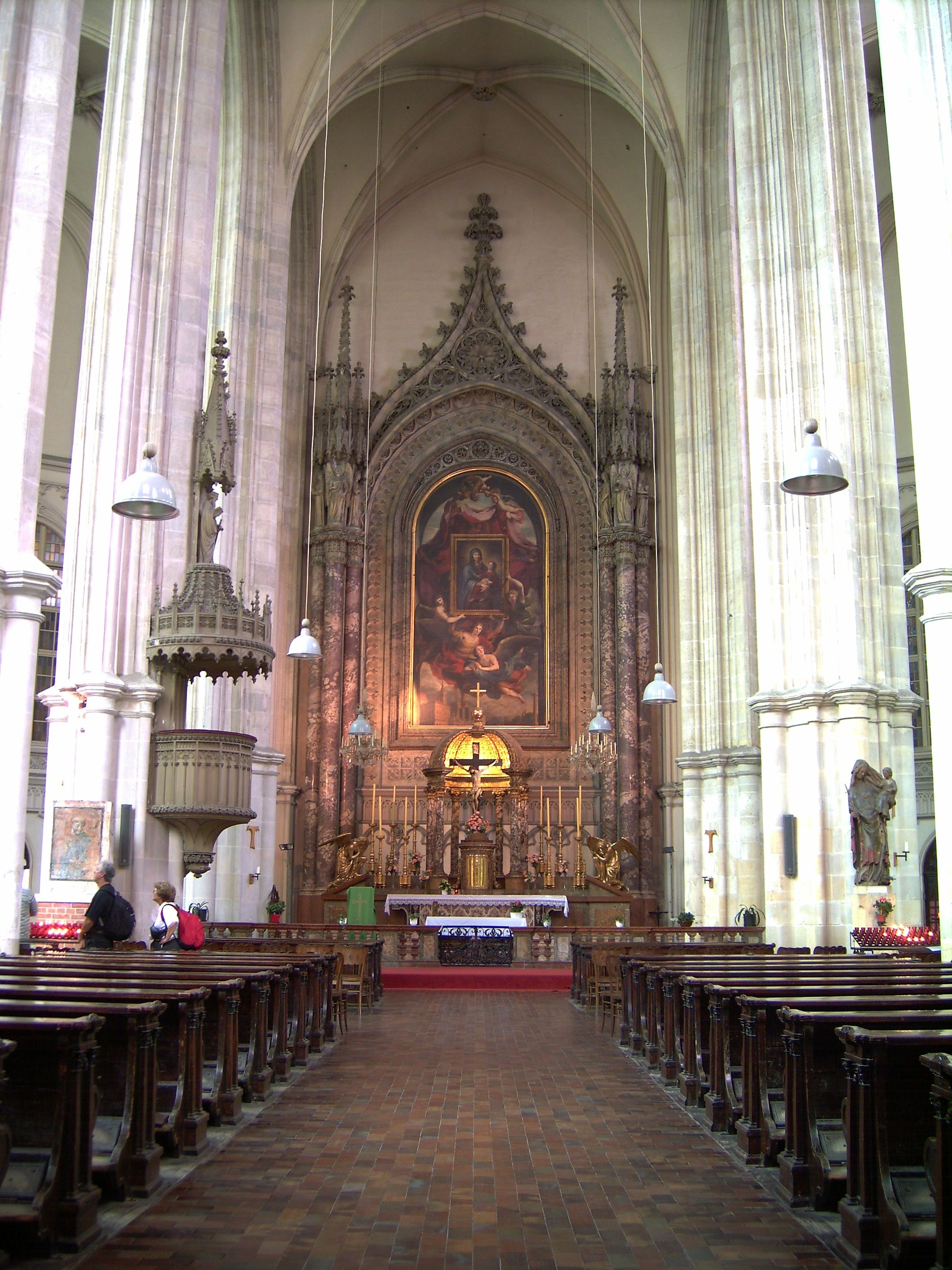 Altar der Minoritenkirche (Wien)